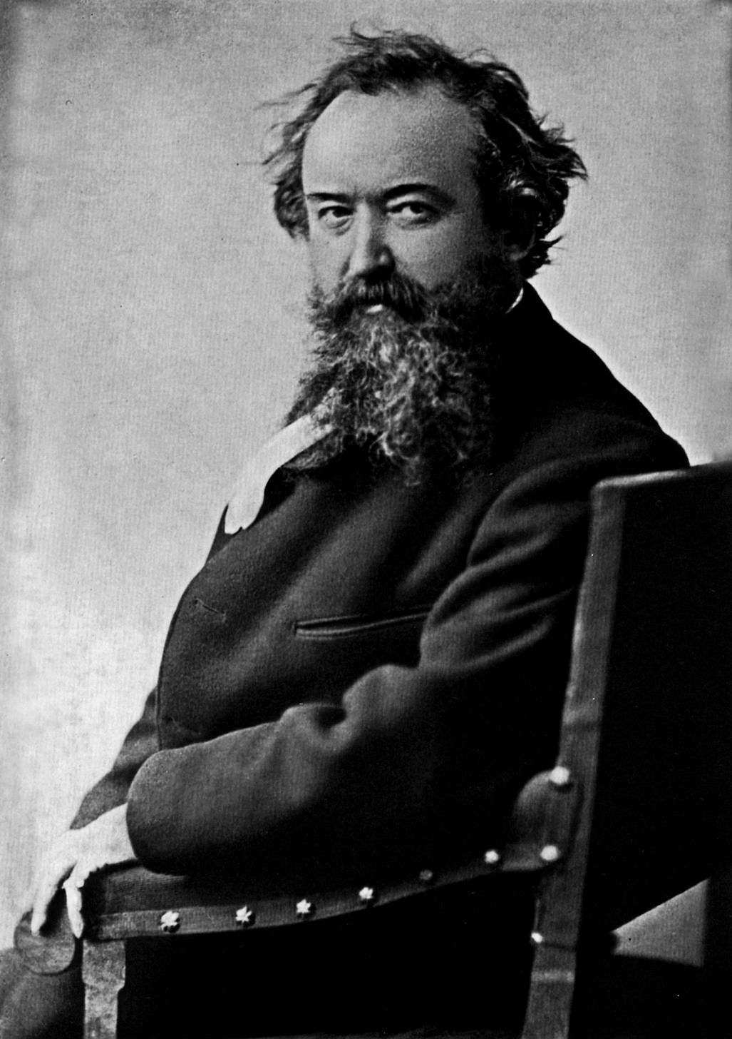 Wilhelm Busch, Fotografie ca. 1882